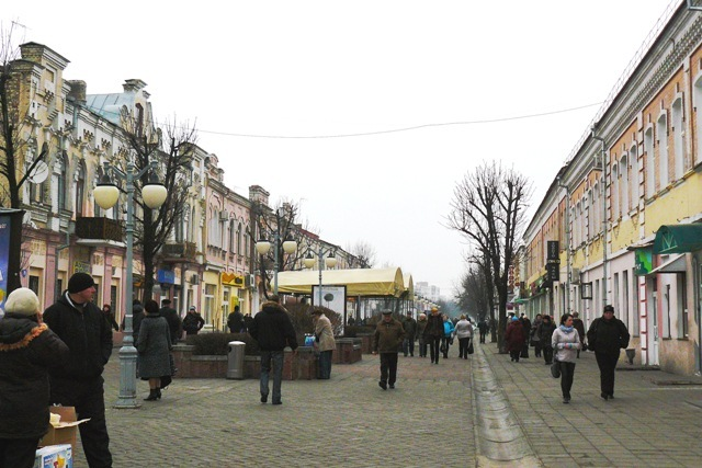 Бобруйск. Фото путешествия по Беларуси.